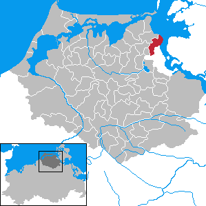 Kramerhof in Mecklenburg-Vorpommern - District Nordvorpommern